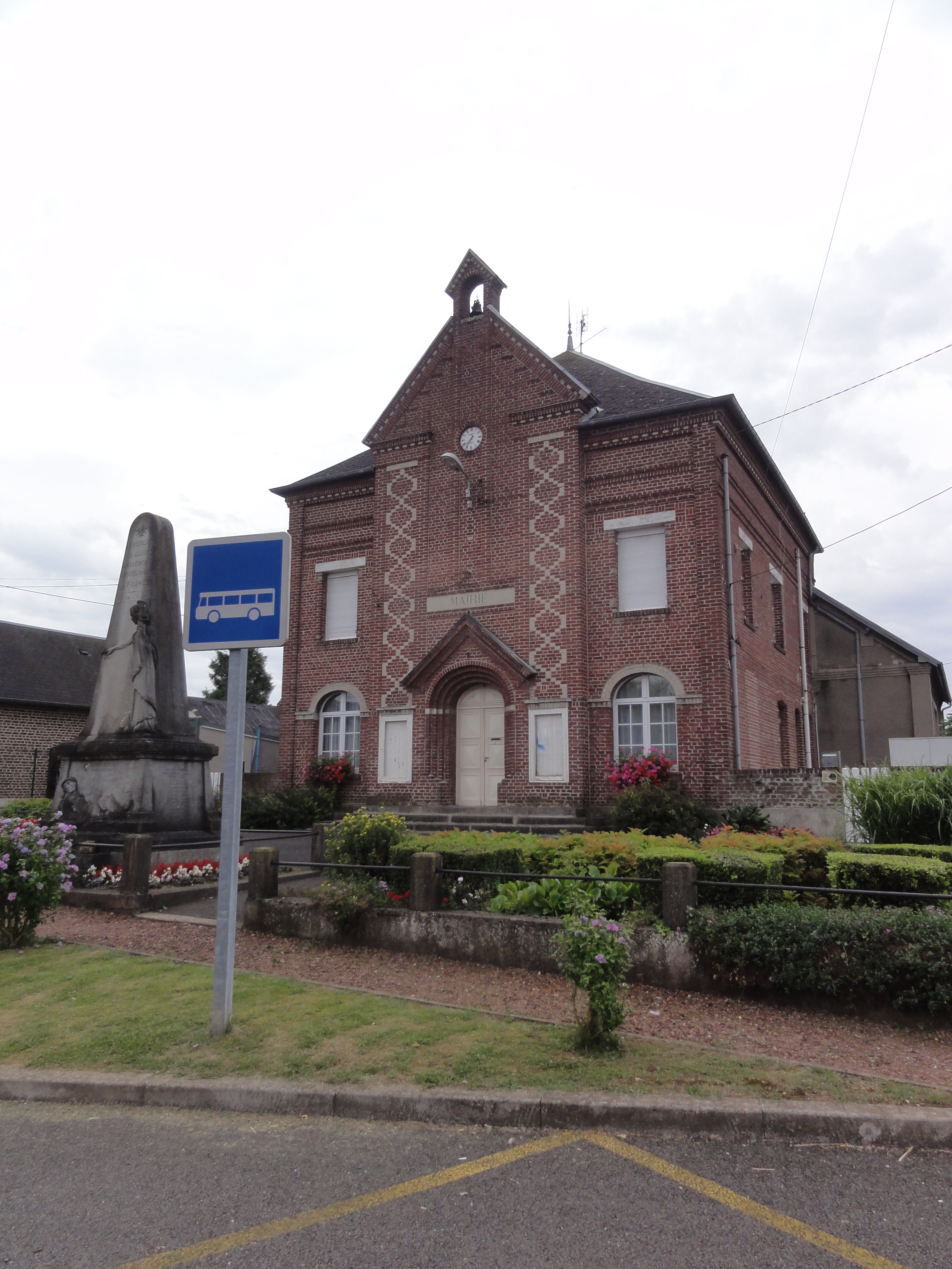 Levergies (Aisne) mairie